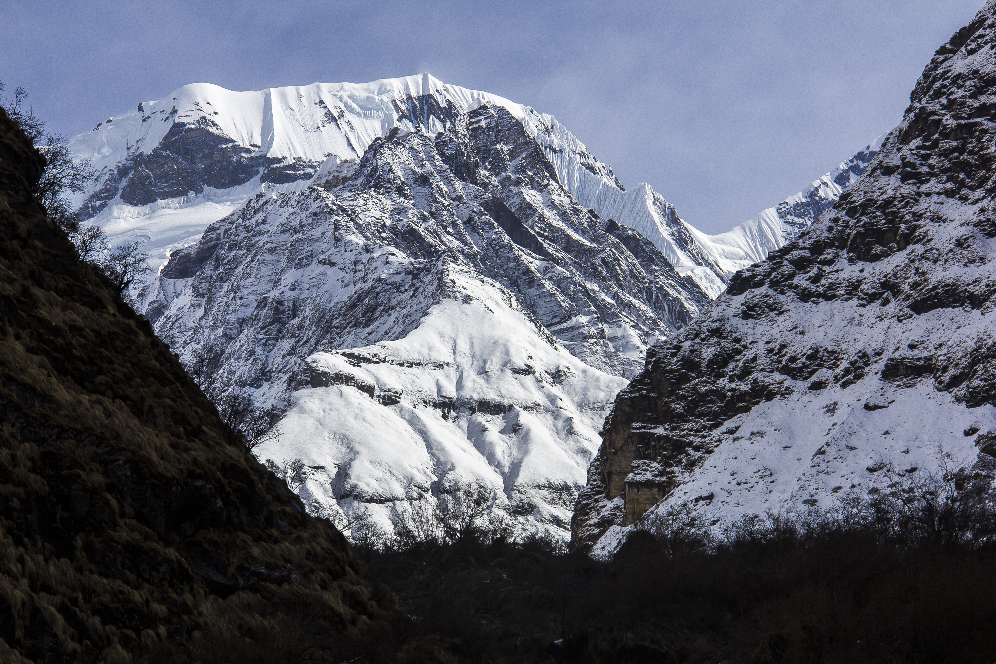 नेपाली: माछापुच्छ्रे अाधार शिविरको केही तलबाट देखिएको अन्नपुर्ण तेस्रो।